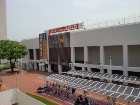 ダイエー鹿児島店の外観。（画像修正済み）